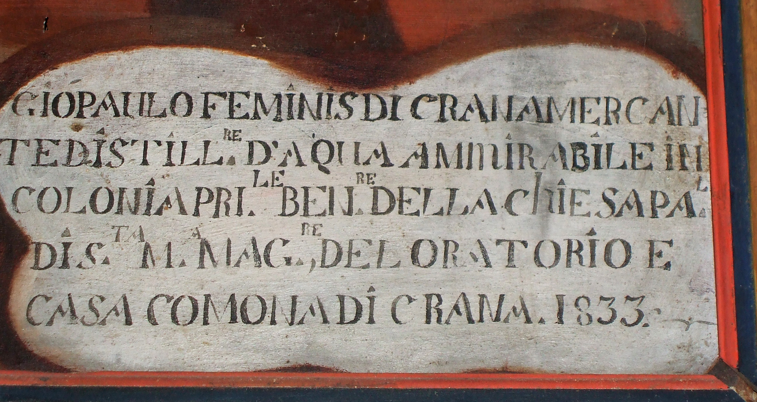 Fonte: Particolare di dipinto custodito nella sacrestia della chiesa di S. Rocco di Crana, Valle Vigezzo. Il ritratto è di discussa attribuzione ma nella parte inferiore destra vi è un attestato, qui nell'immagine, delle opere di beneficienza di Giovanni Paolo Feminis (Crana ca 1660-Colonia 1736) Karl Kempkes:Analisi del valore documentario dei cosiddetti Ritratti di Feminis